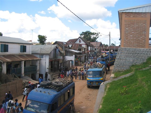 Gare_routière d'Anjozorobe